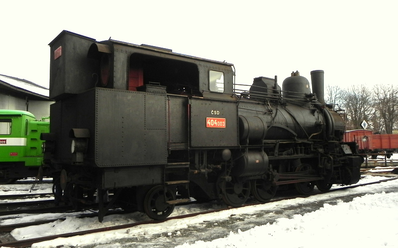 Ozubnicová parní lokomotiva řady 404.003 ve výtopně Jaroměř